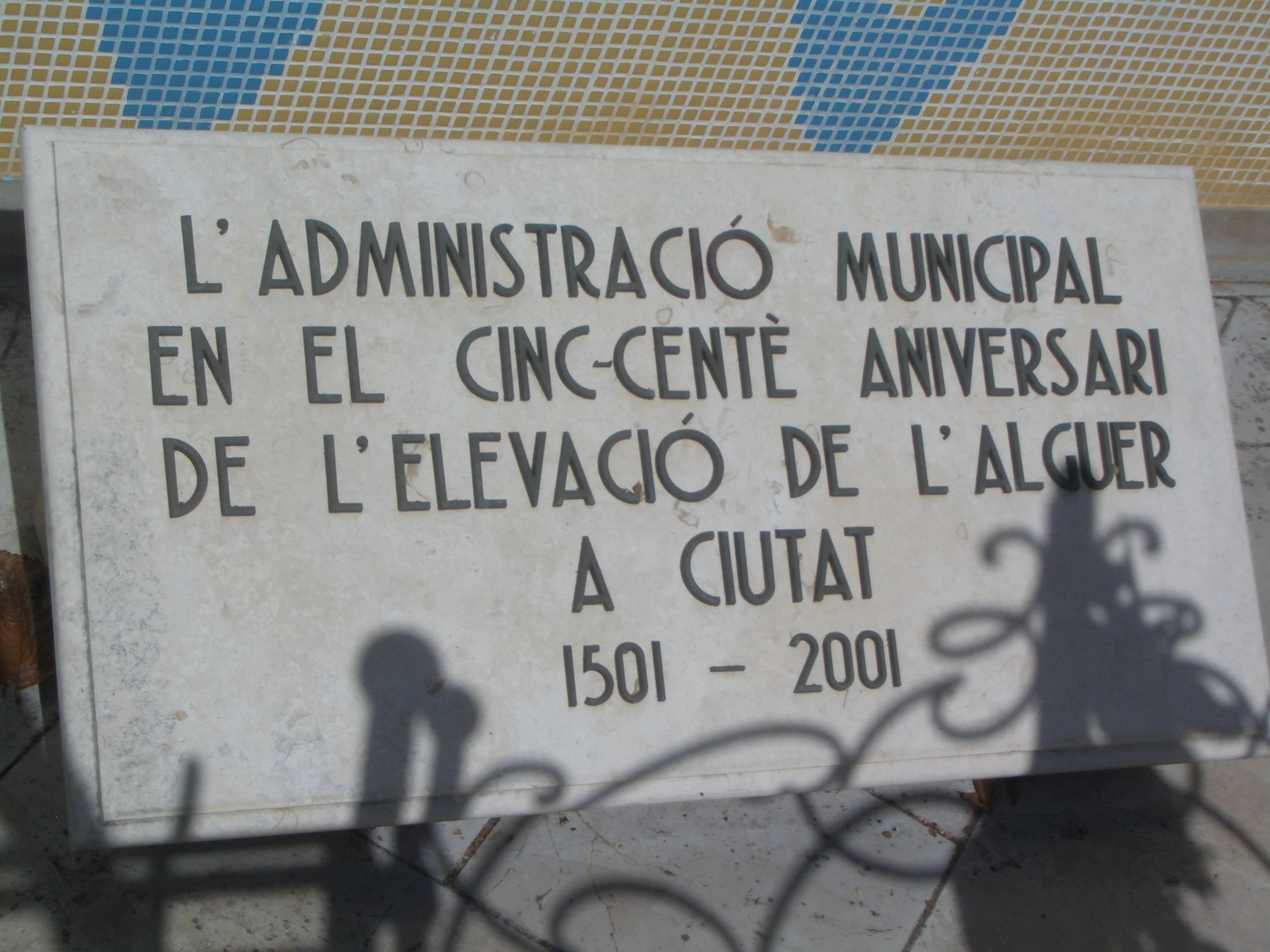 Inscripció al peu del monument a la unitat de la llengua